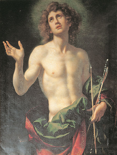 San Sebastiano, o/tv, 130 x 90 cm, Galleria Corsini, Firenze